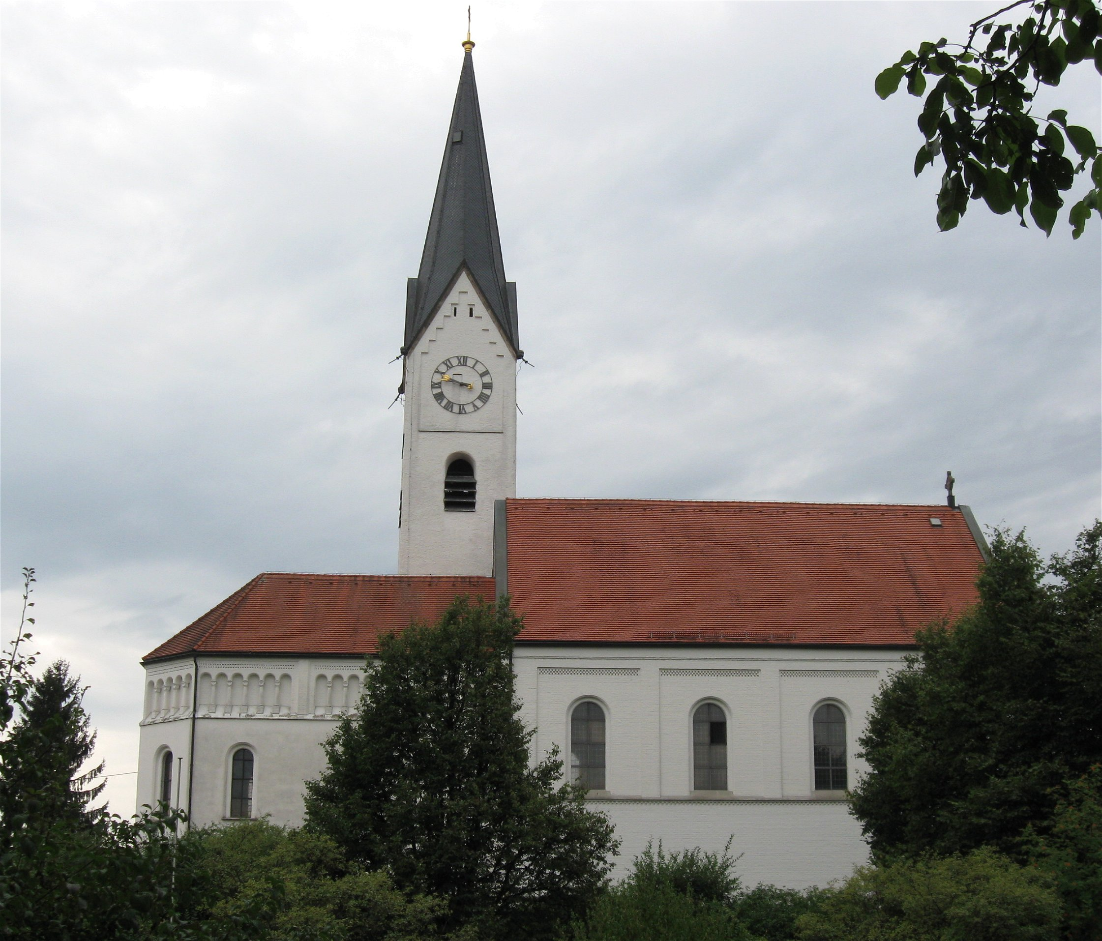 Pang; Grünthalweg 1. Kath. Pfarrkirche Mariä Himmelfahrt, Saalkirche, Chor, Sakristei und Turm 15. Jh., Langhaus neuromanisch von C. Reuter, 1850/52; mit Ausstattung; alte Friedhofmauer mit Strebepfeilern, 17./18. Jh.